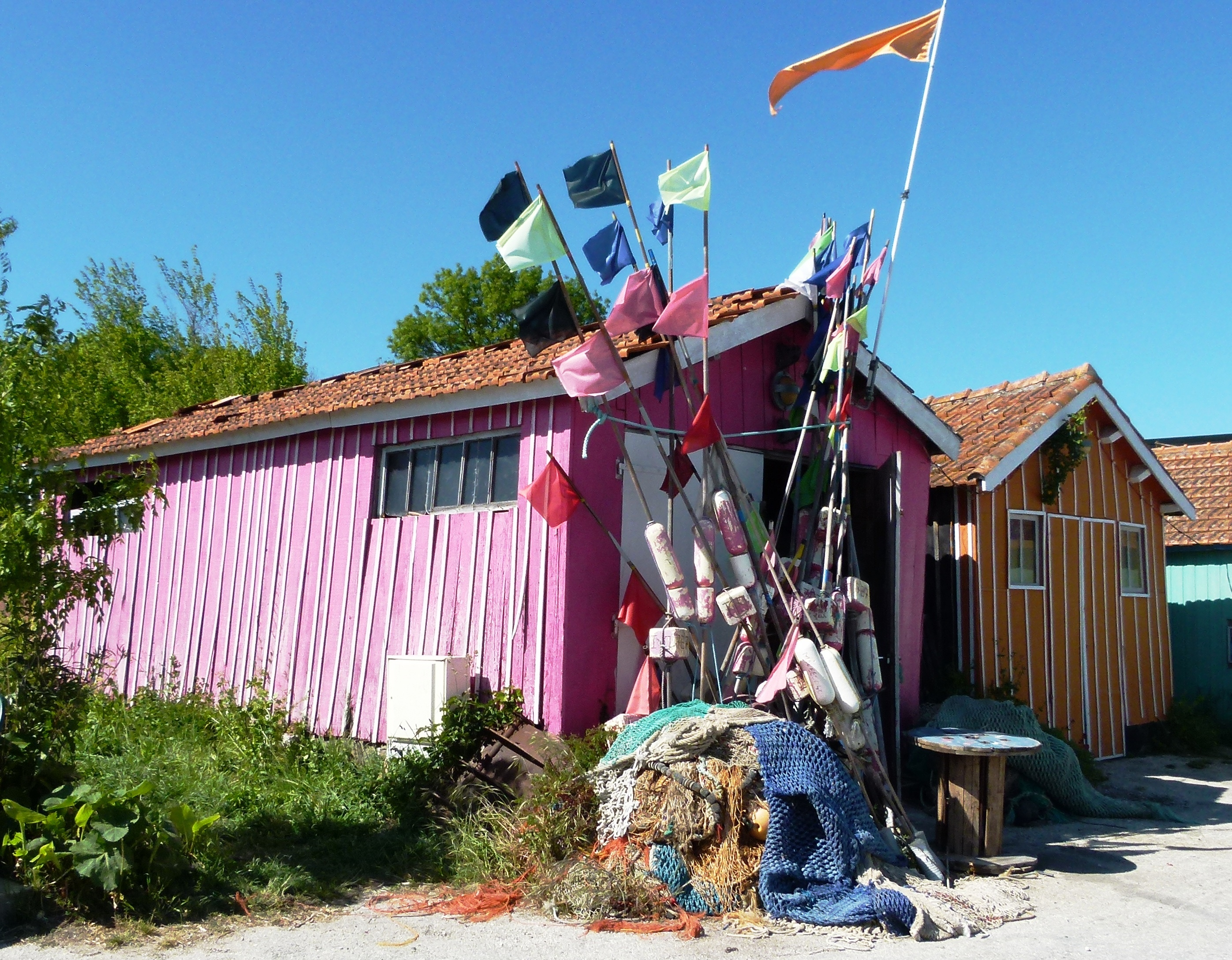 Le château d’Oléron : Cabanes de pêcheur (45.883758, -1.192706)